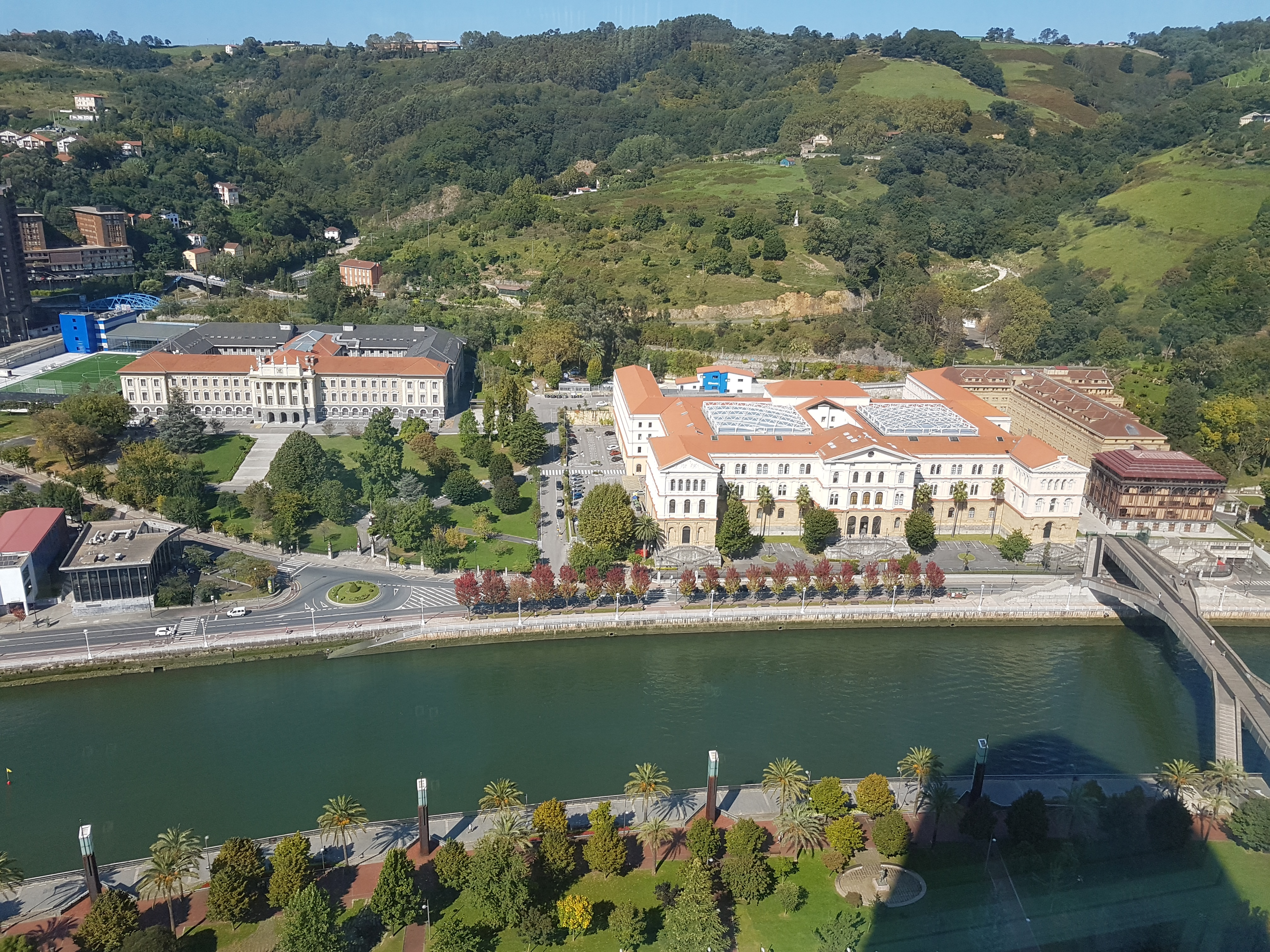 Abandoibarra.